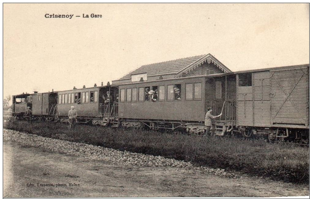 Gare du tramway de Champdeuil - Crisenoy, Seine-et-Marne, France, dans les années 1920.